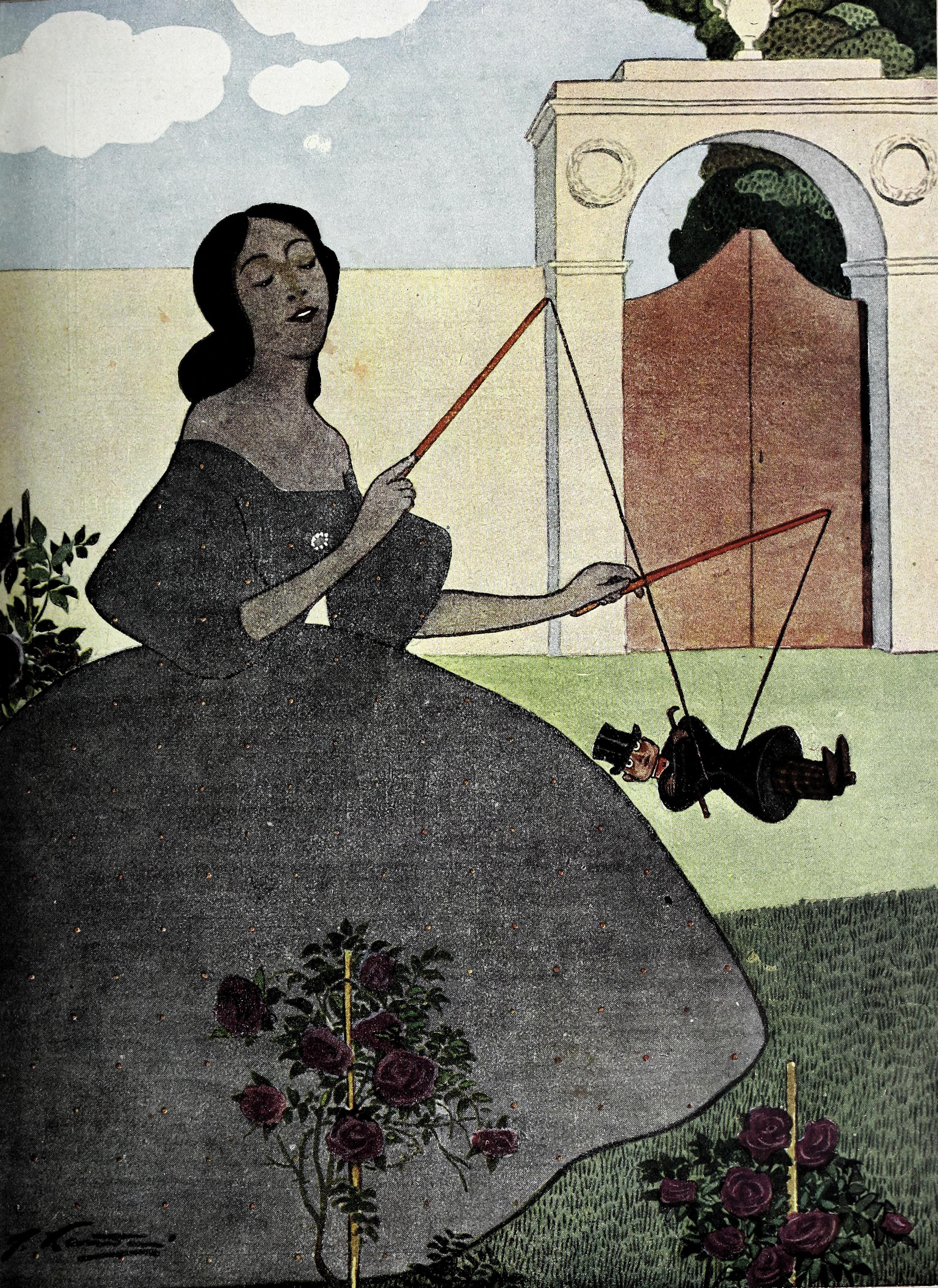 El diábolo